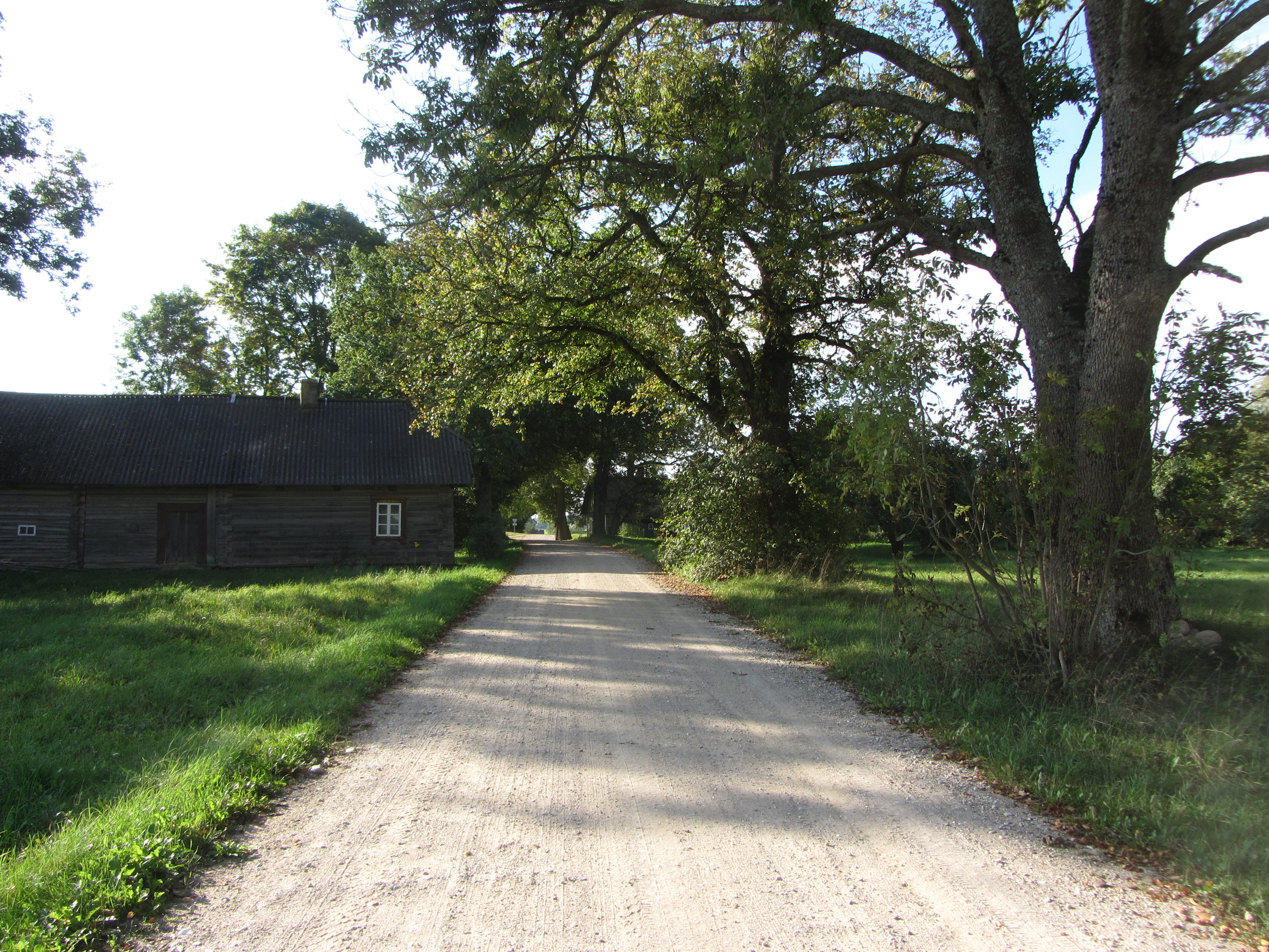 Salako sen., Lithuania